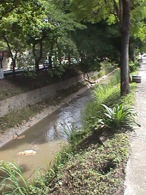 Quebrada La Guairita a nivel de la Ubanizacion La Trinidad - Municipio Baruta, Estado Miranda - Venezuela